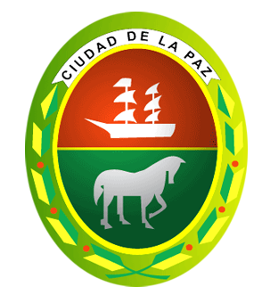 Ciudad de La Paz escudo